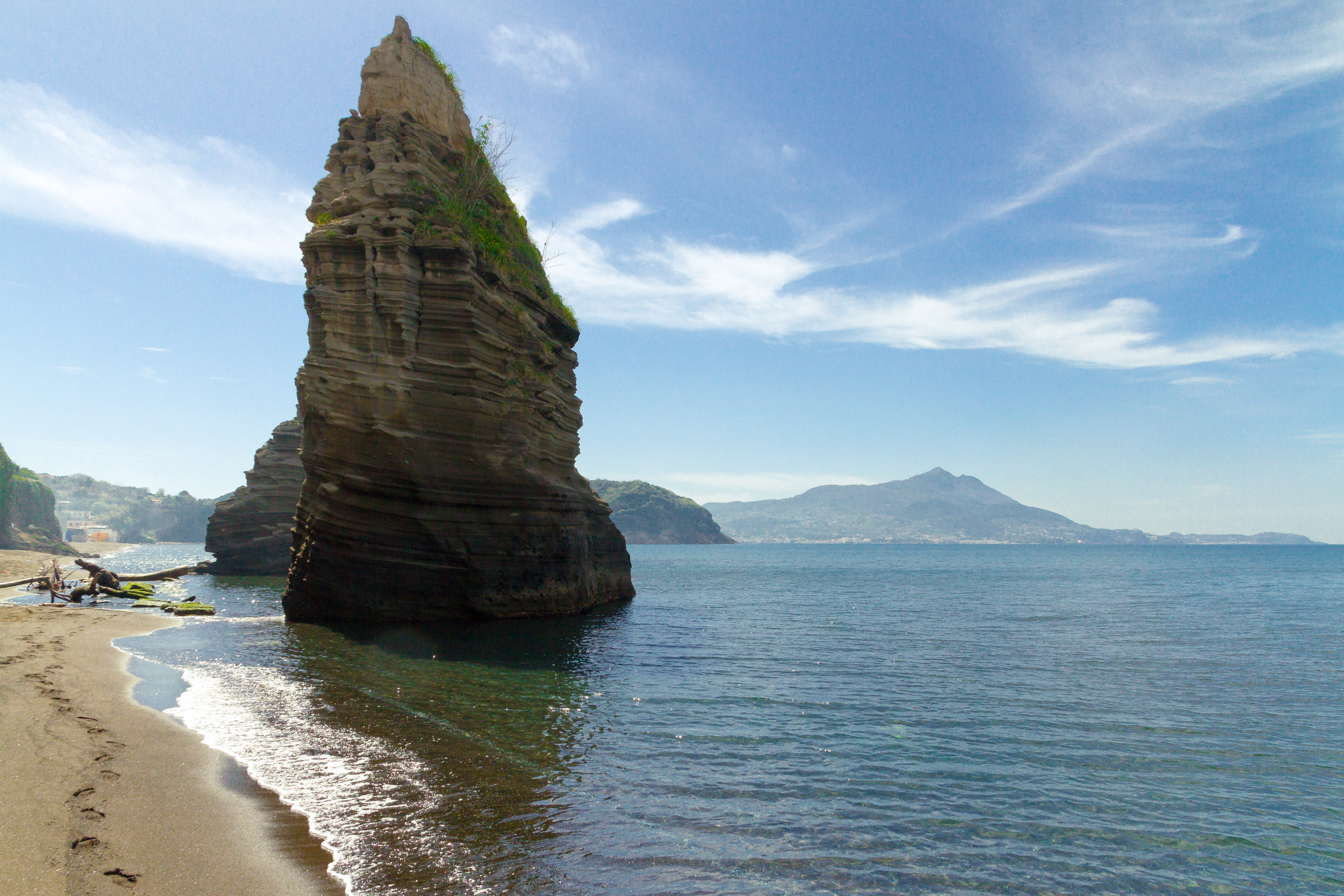 Procida - Spiaggia di Ciraccio, faraglioni